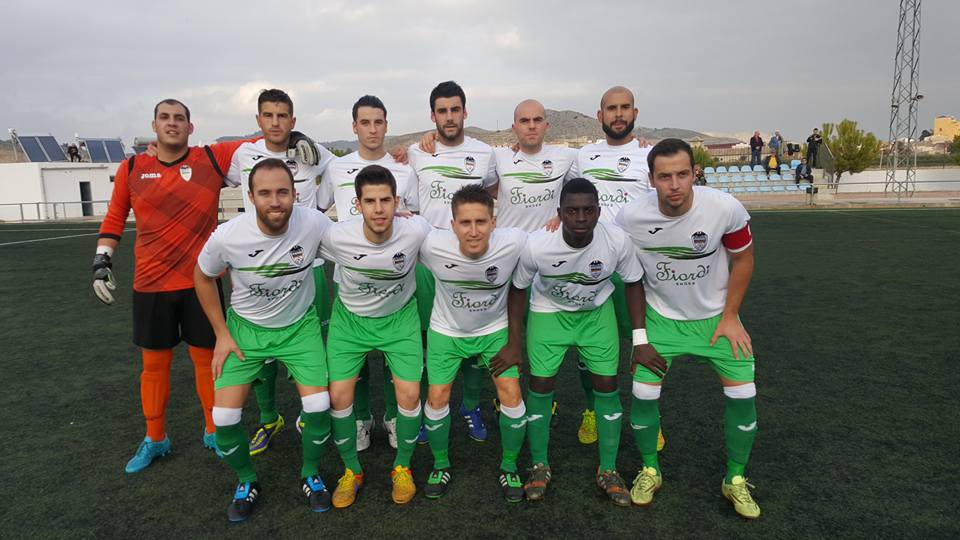 Vemos a el jugador Lamin en su actual equipo hondon de las nieves